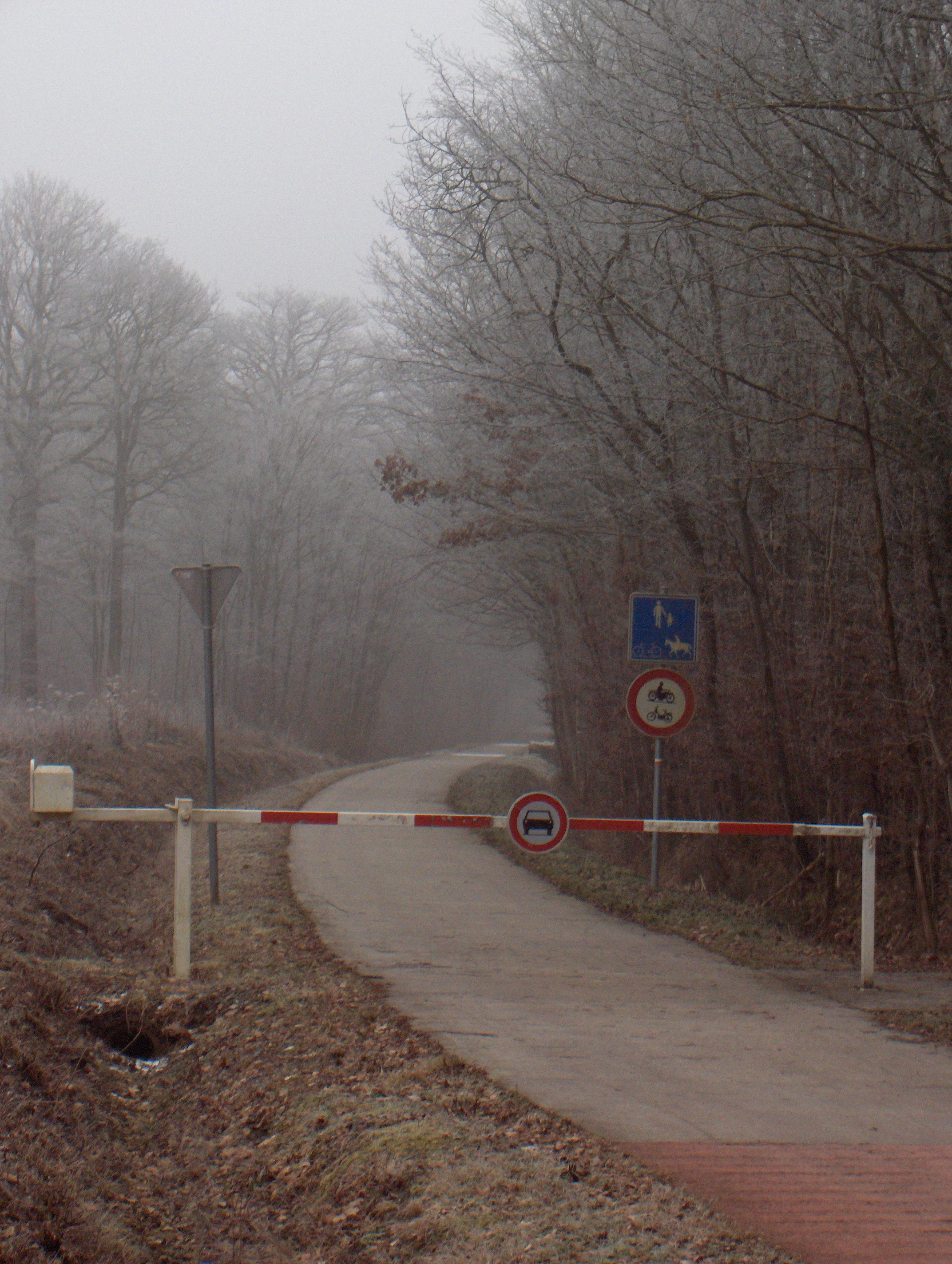 Bahndamm der ehemaligen belgischen Eisenbahnlinie Charleroi - Thuin-Ouest - Beaumont Chimay (Linie 109). Nach der Stilllegung wurde die Strecke Chimay-Froidchapelle zu einem Rad- und Wanderweg umgeformt im Rahmen des sog. RAVeL-Plans ("Reseau Autonome de Voies Lentes") der wallonischen Region.